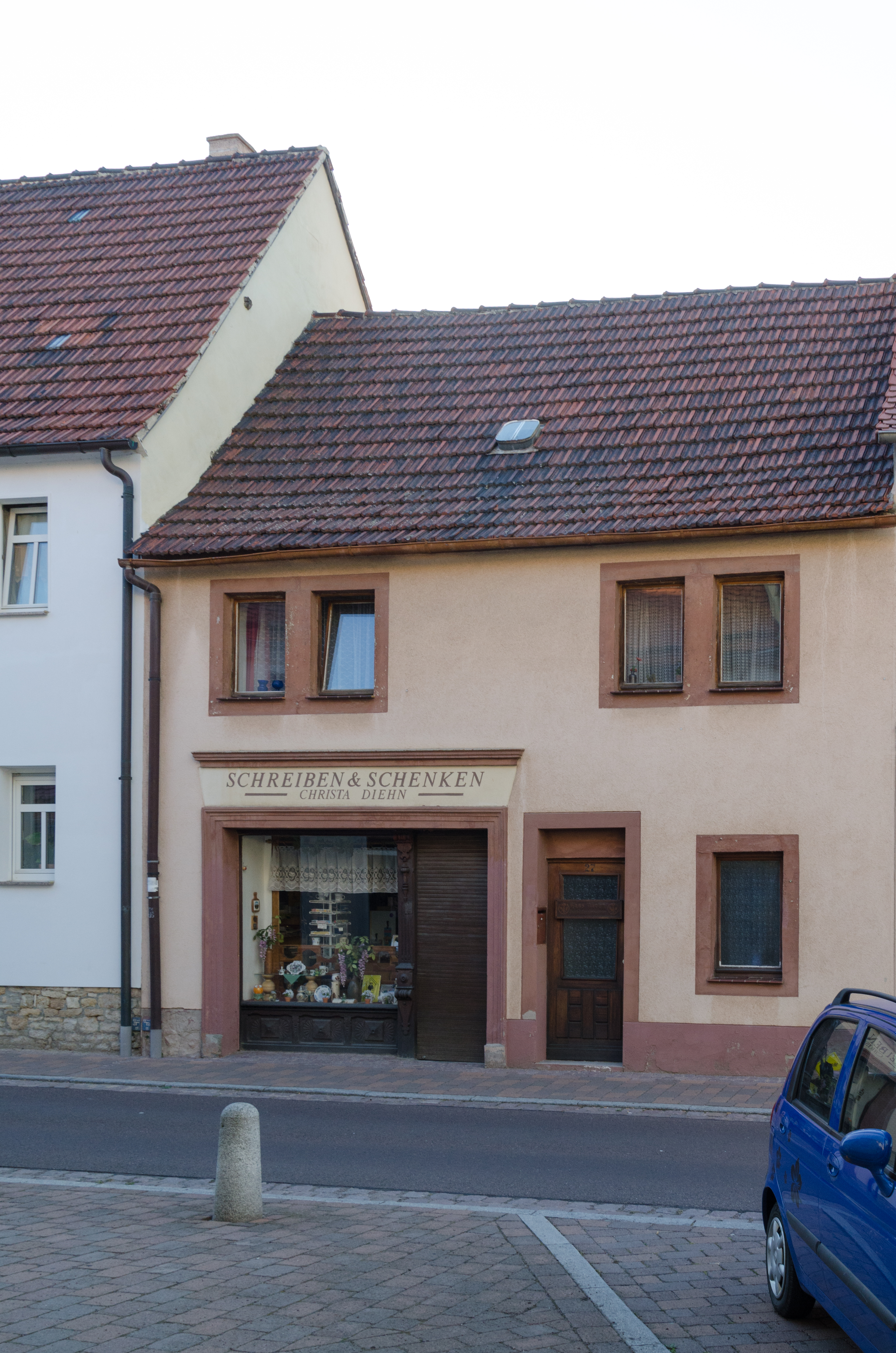 Querfurt, Klosterstraße 27